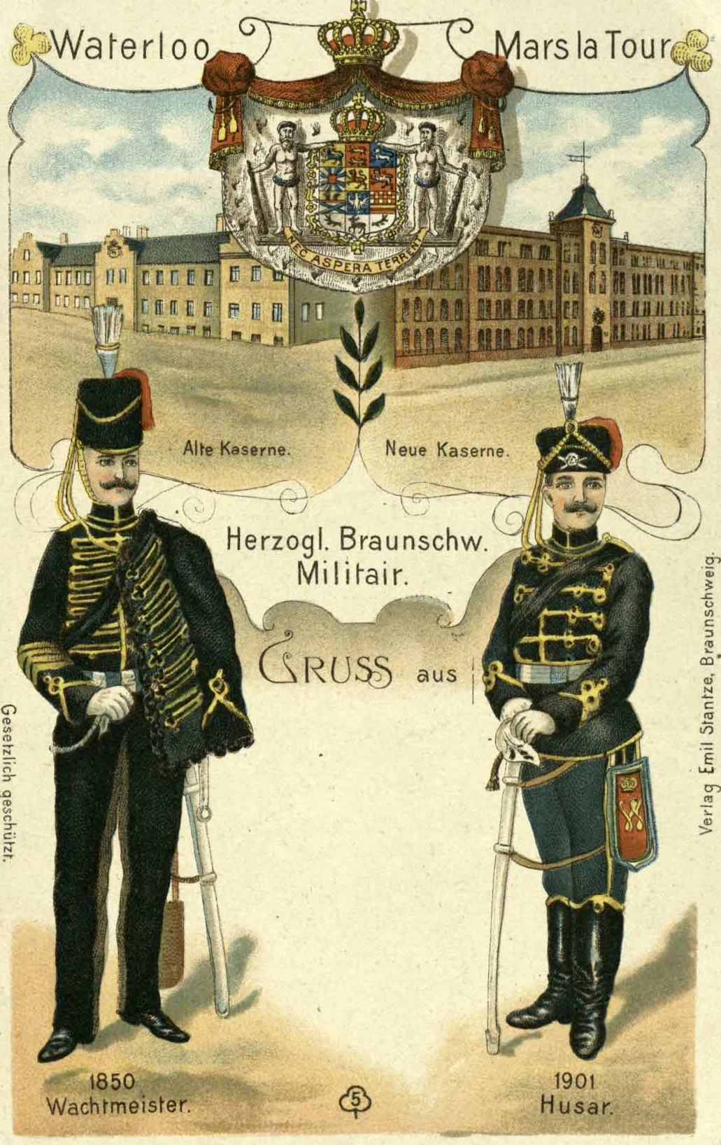 Braunschweig, Braunschweigisches Husaren-Regiment Nr. 17: Braunschweiger Husaren und Kasernen, die „alte“ Waterloo-Kaserne und die „neue“ Mars-la-Tour-Kaserne (Postkarte um 1901).